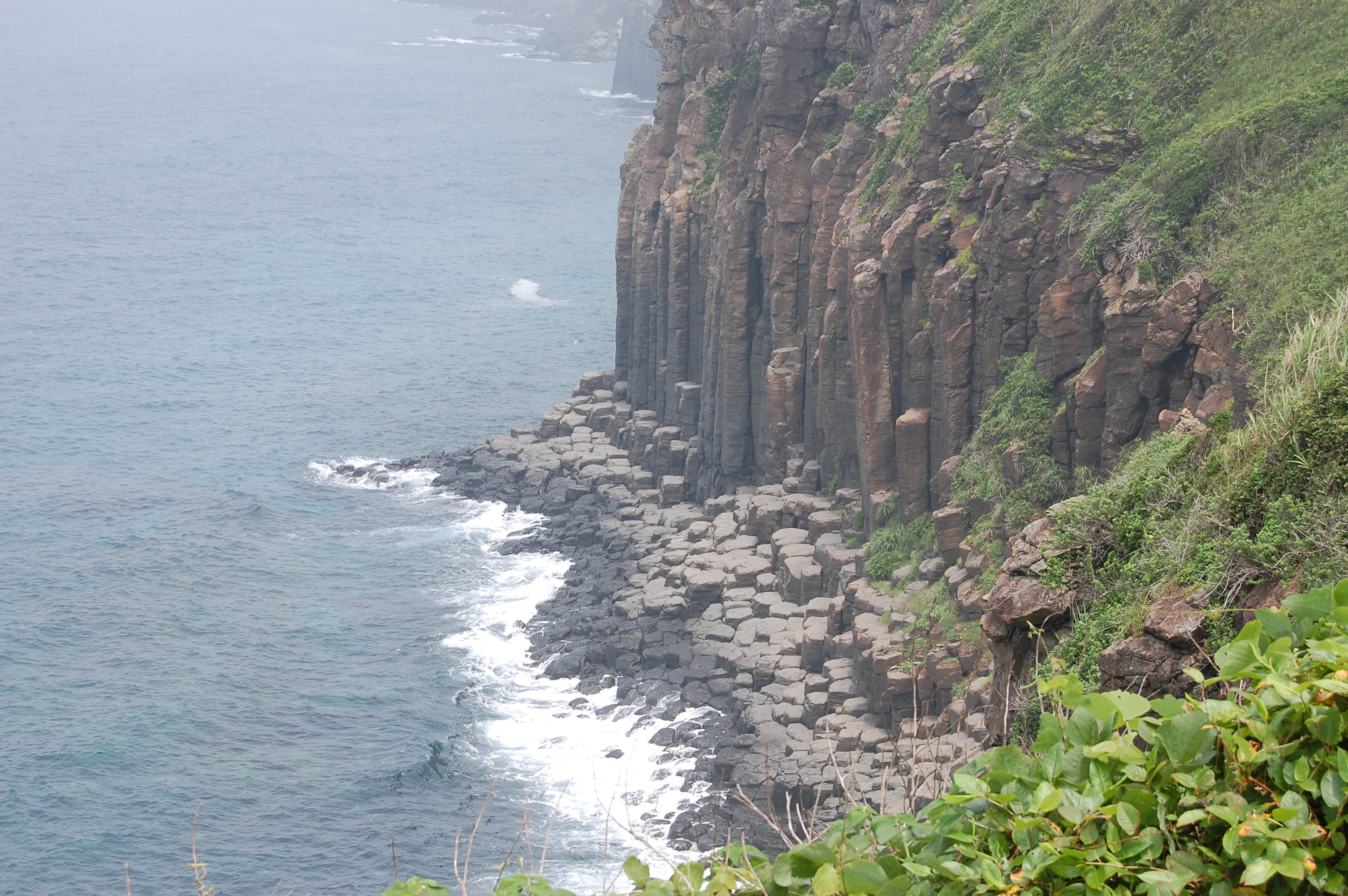 生月島にある塩俵断崖